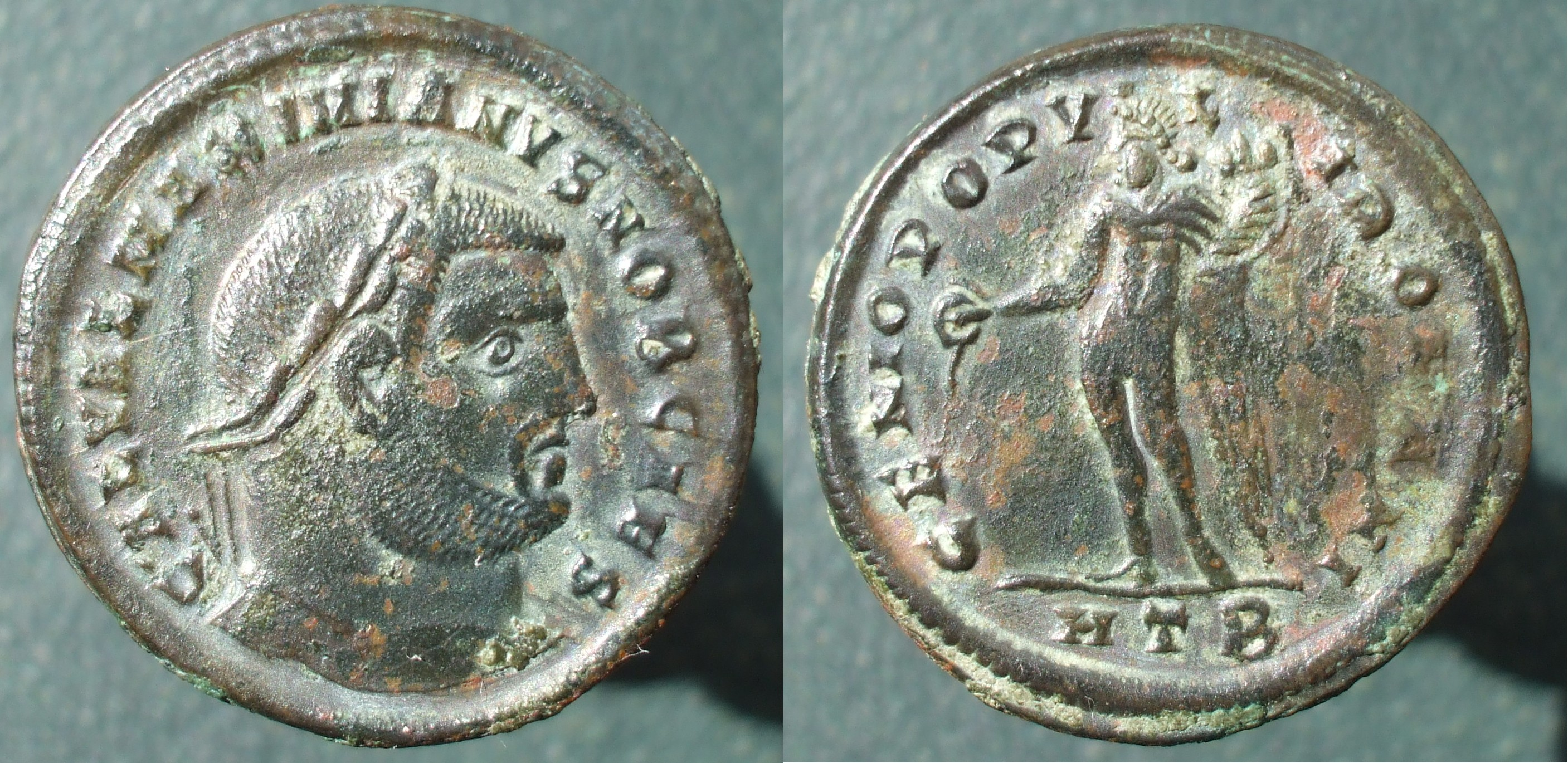 Maximien Galère, nummus, Héraclée, Tétrarchie, Genio Populi Romani